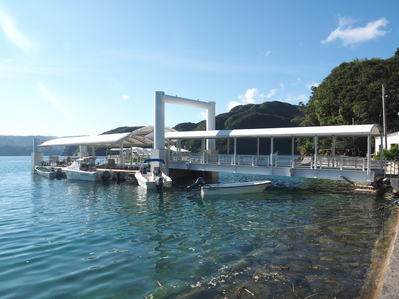 船浮港浮桟橋（沖縄県八重山郡竹富町西表島船浮）